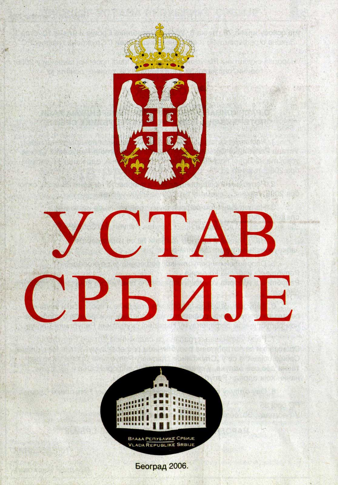 Устав Србије из 2006. године